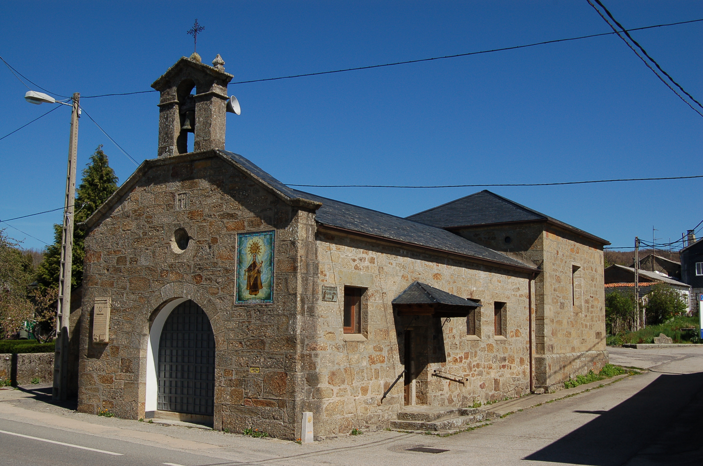 Ermida da Nosa Señora do Carme de Asturianos